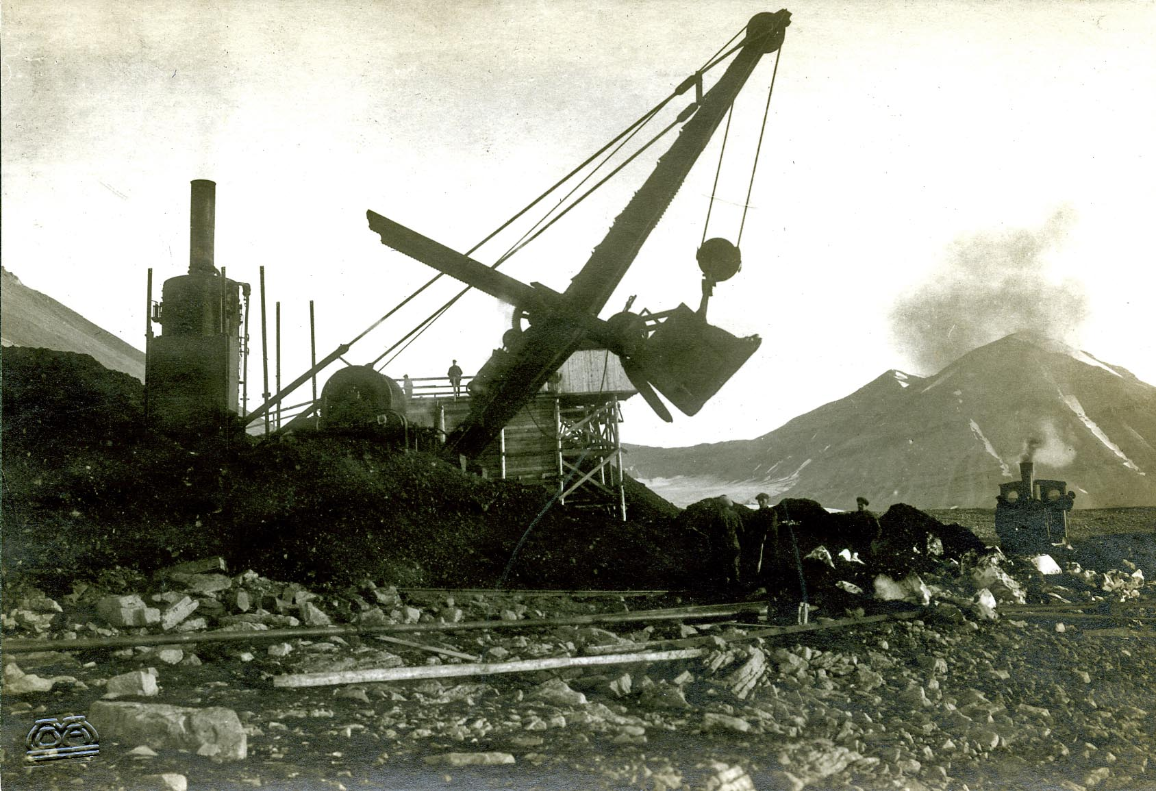 Dampskuffen som lesser kullet fra lageret opp i jernbanevognene. Skuffen tar 3 kbm. Arkivref.: PA-1632D1_2_10 Foto: Sigvald Moa